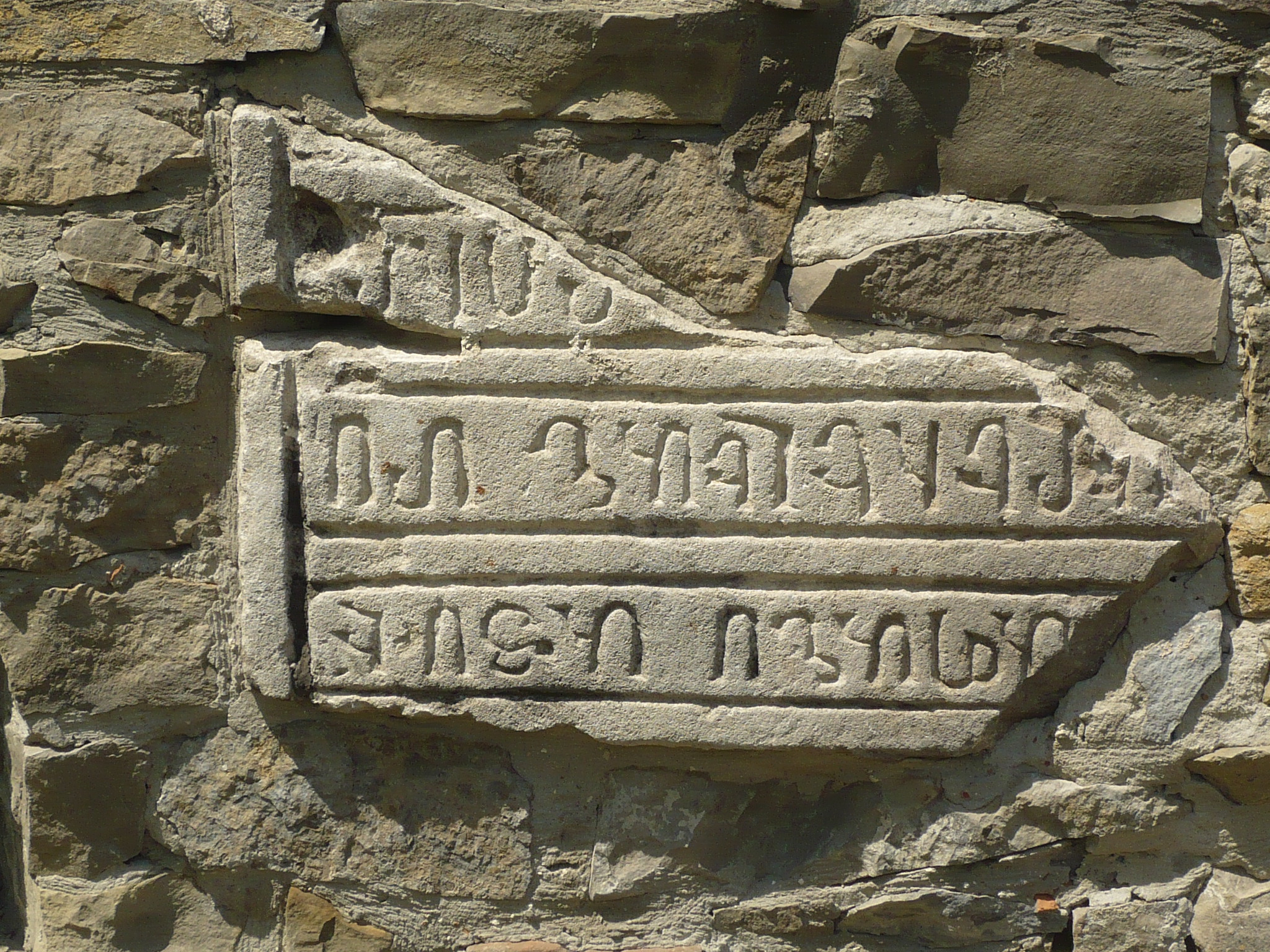 Tablica na murze wokół kościoła ormiańskiego pw. Niepokalanego poczęcia NMP